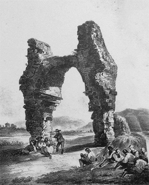 Das Heidentor.